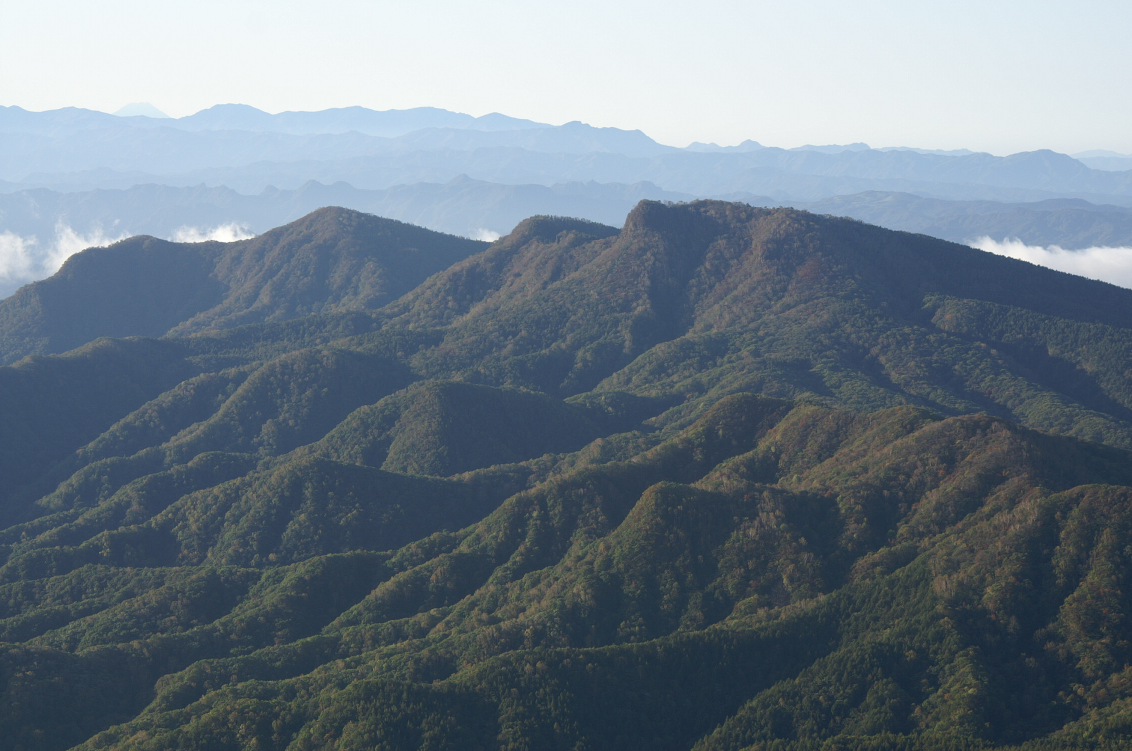 浅間隠山から見た鼻曲山